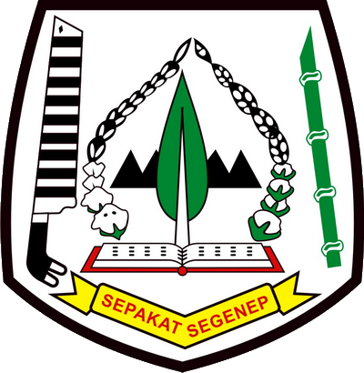 Lambang Kabupaten Aceh Tenggara, Aceh, Indonesia